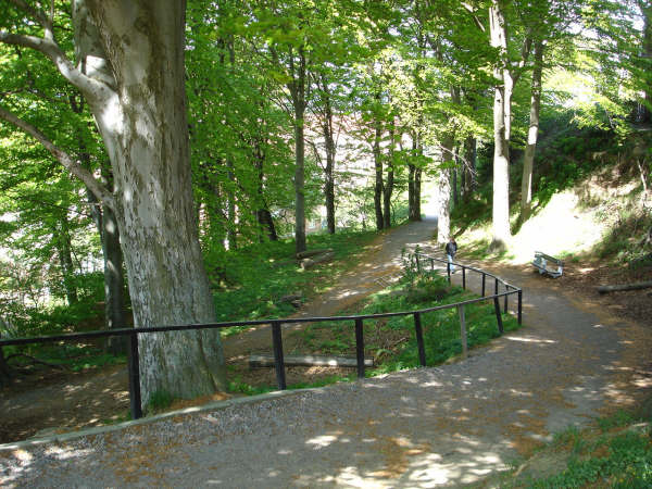 View along Landborgspromenaden in Helsingborg